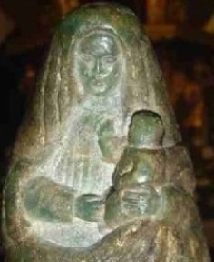 Detalle de la escultura original hecha en jade y de origen desconocido, aparecida en Cartago a un indígena en 1634